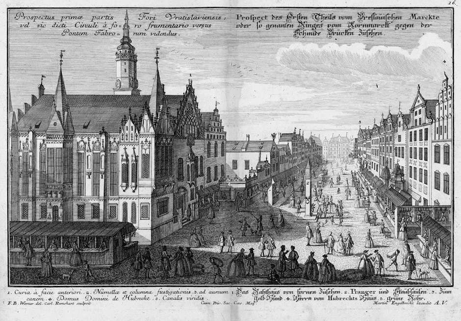 Breslau (Wrocław), aus: Friedrich Bernhard Werner: Accuratum ectypum & repraesentatio … illustrissimae urbis Vratislaviae in Silesia inferiore, Kupfertafeln von Carl Remshart und Johann Matthias Steidlin nach Friedrich Bernhard Werner. Augsburg, Martin Engelbrecht, o. J. (um 1736)